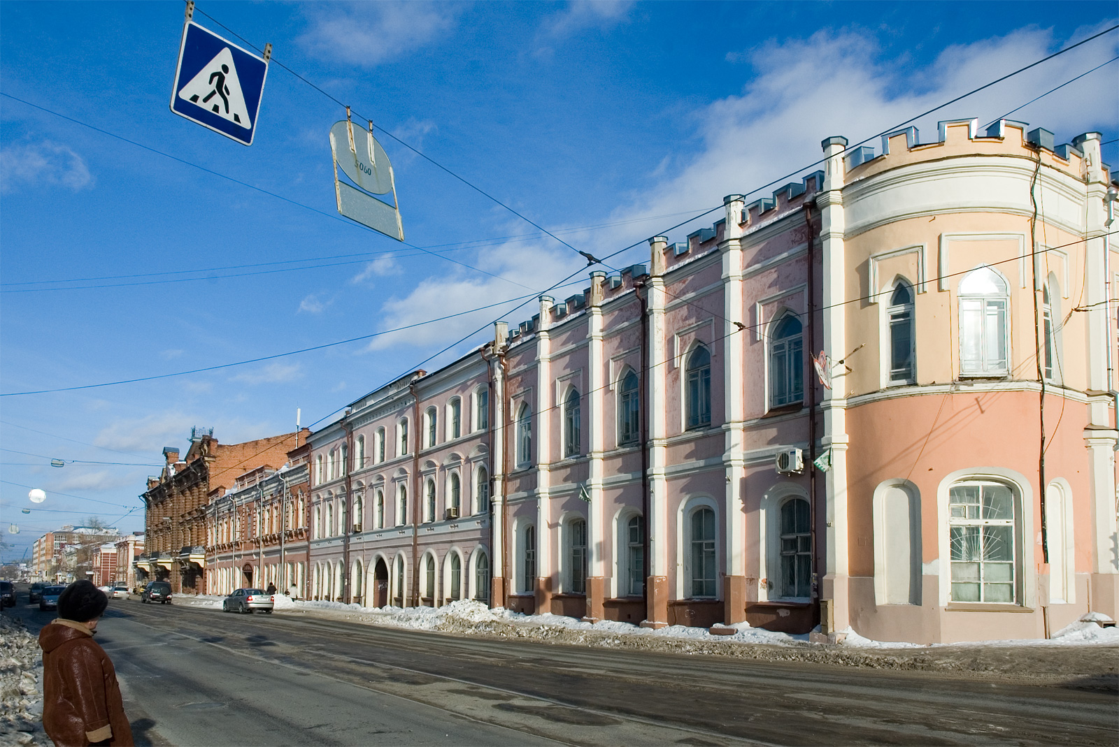 Начало улицы Розы Люксембург в Томске